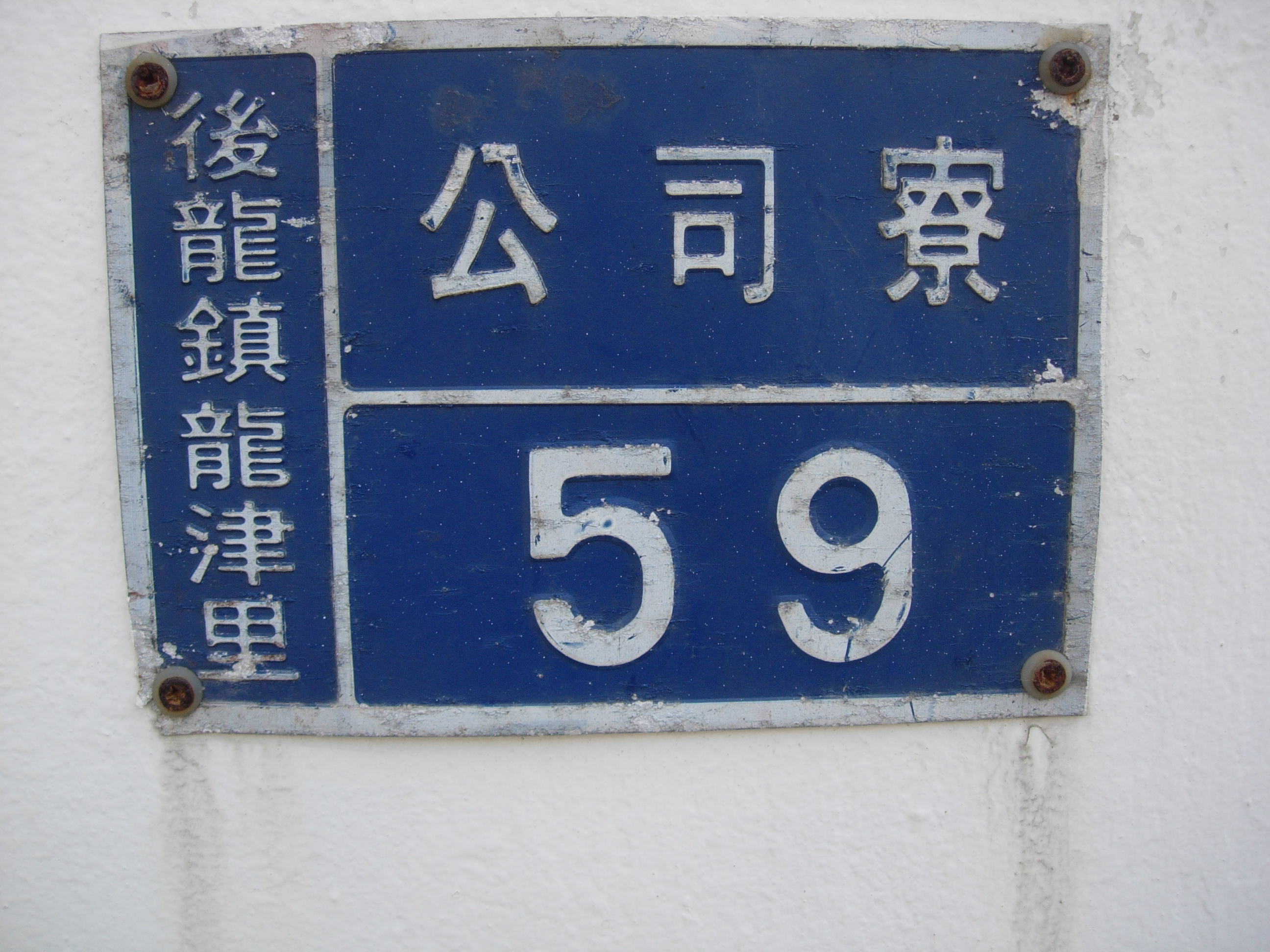 中文（台灣）: 後龍公司寮門牌